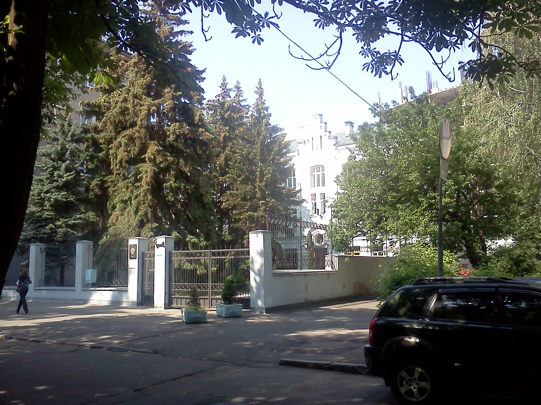 Посольство Куби в Києві